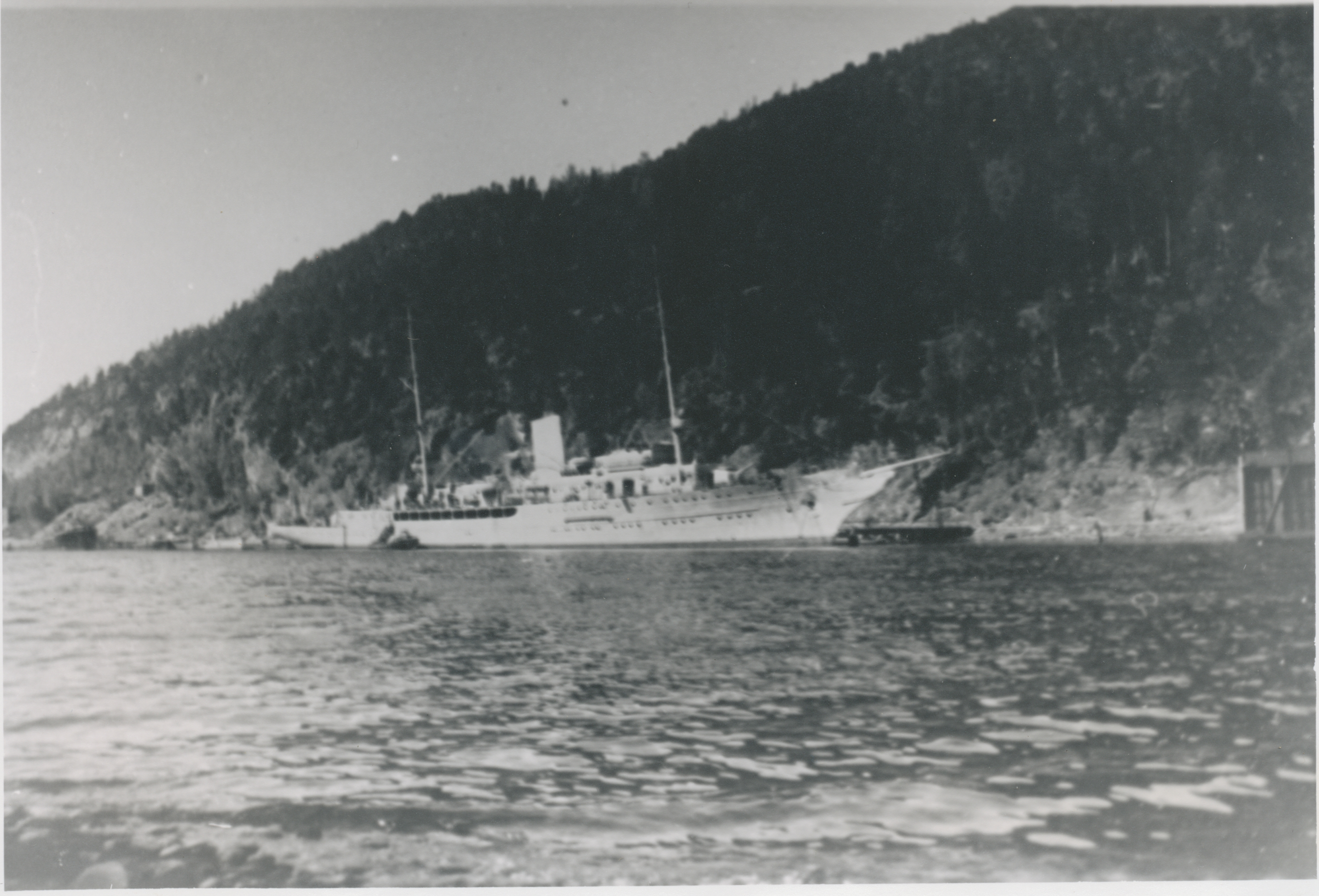 Aviso "Grille" til kai i Hopla i Åsen, under eller like etter 2. verdenskrig. Fotograf / Photographer: Ukjent Fotoeier / Photo owner: Åsen Museum og Historielag Digitalisering / Digitizing: Arne Langås Foto-ID / Photo ID: 001-1003 Har du utfyllende opplysninger? Legg gjerne igjen en kommentar nedenfor eller send e-post til . | Do you have additional information? Please leave a comment or send an e-mail to .